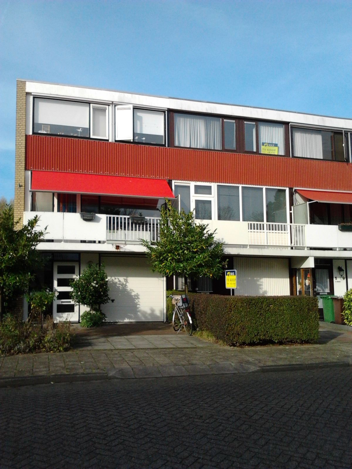 driveinn woning